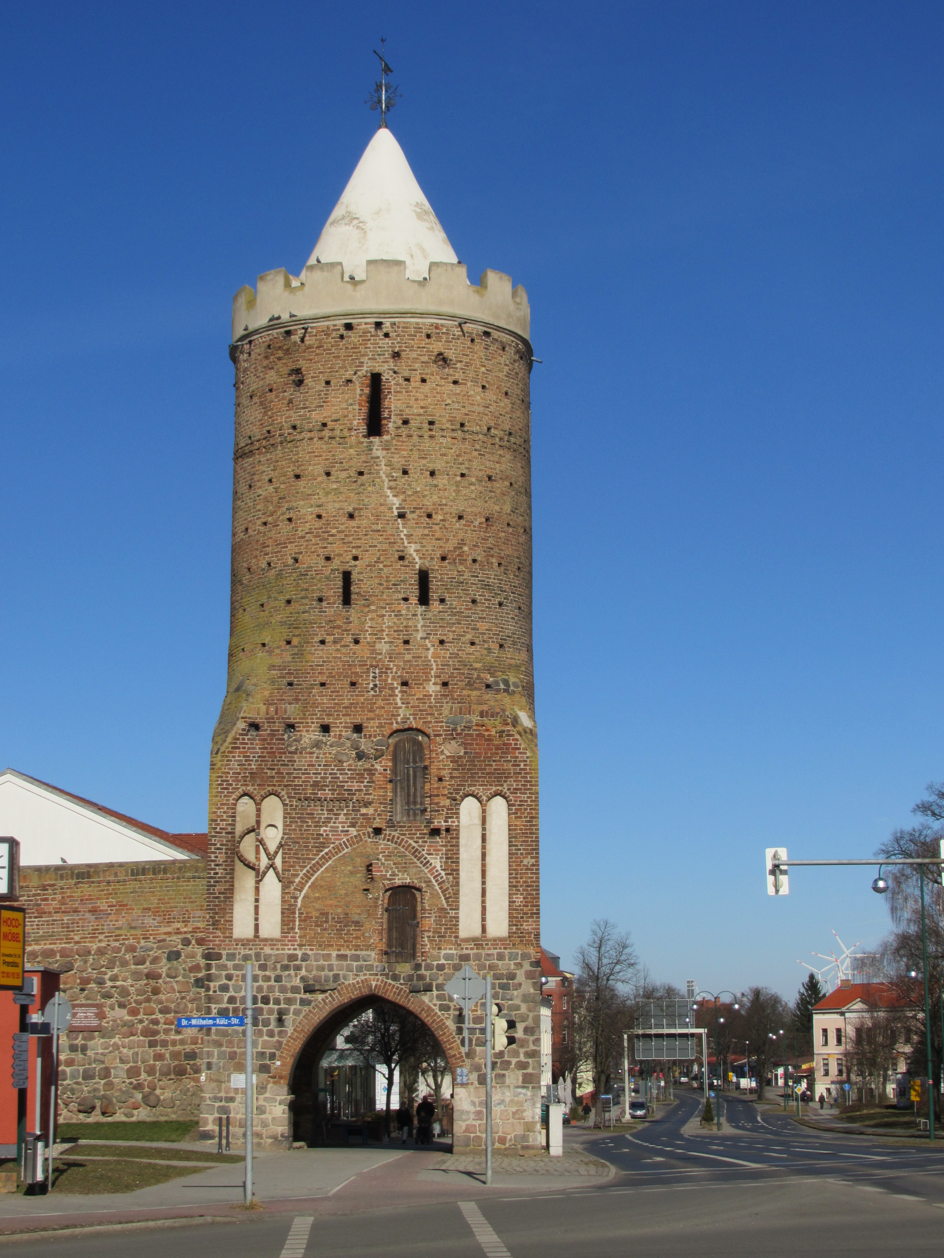 Prenzlau Stettiner Tor (Innenstadtsicht)